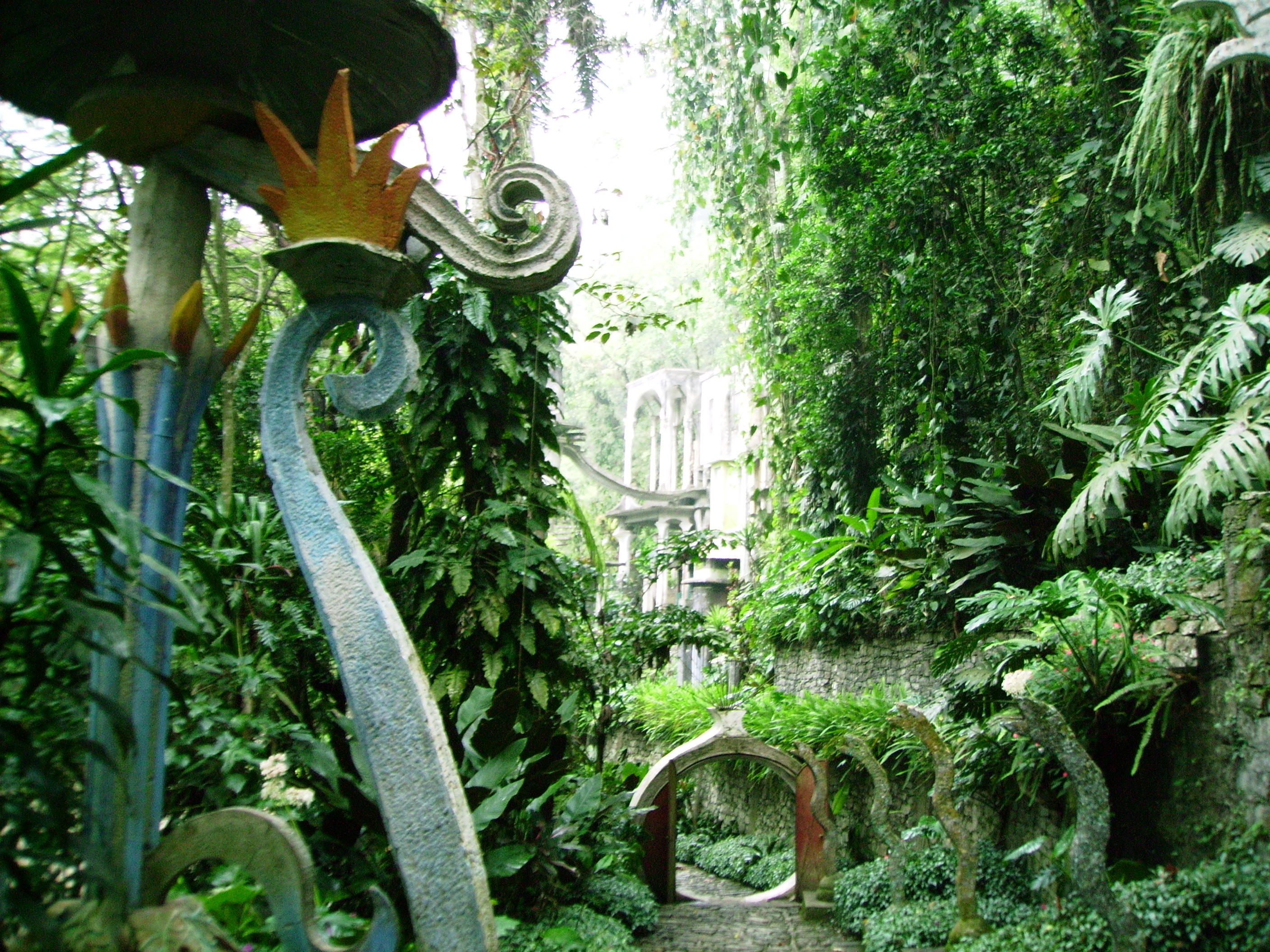 Sir Edward James' surrealist garden, Las Pozas, Xilitla, Mexico